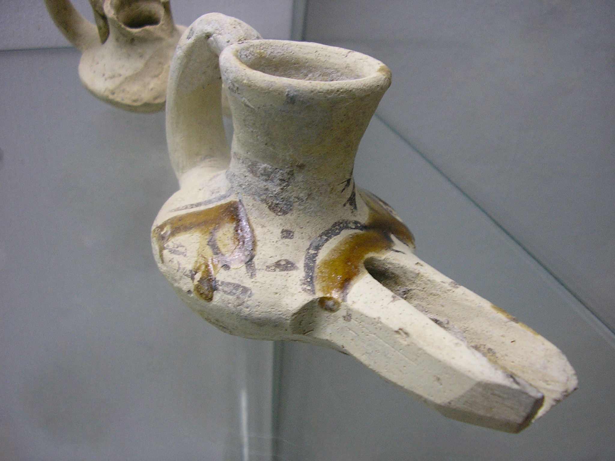 Candil árabe de Algeciras Candil árabe, aproximadamanete del siglo XI depositado en el museo municipal de Algeciras. Fotografia realizada en abril de 2008 para wikimedia.